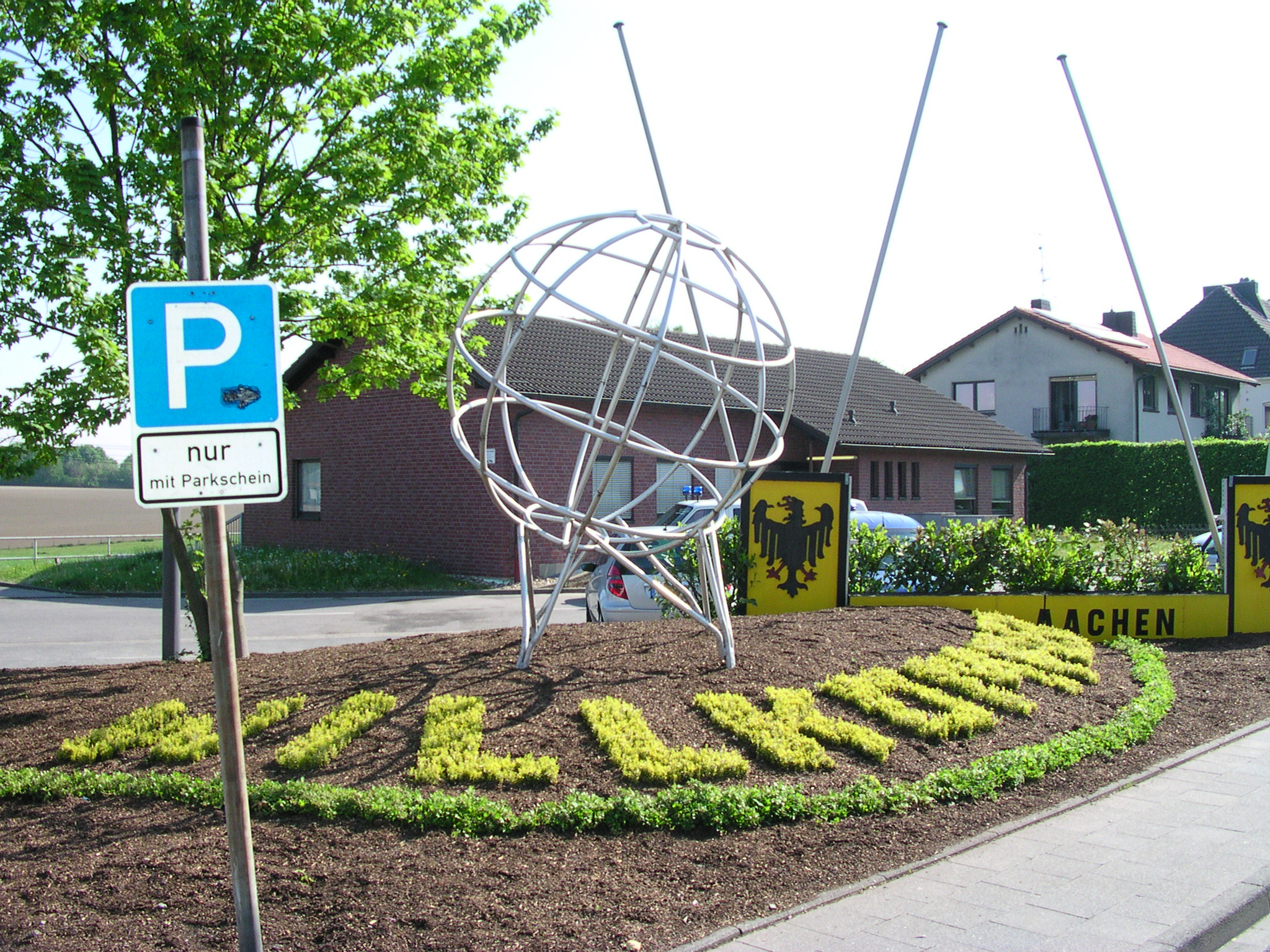 Aachen, Blumenbeet „Willkommen“ mit Weltkugel am Grenzübergang zu Vaals (NL)